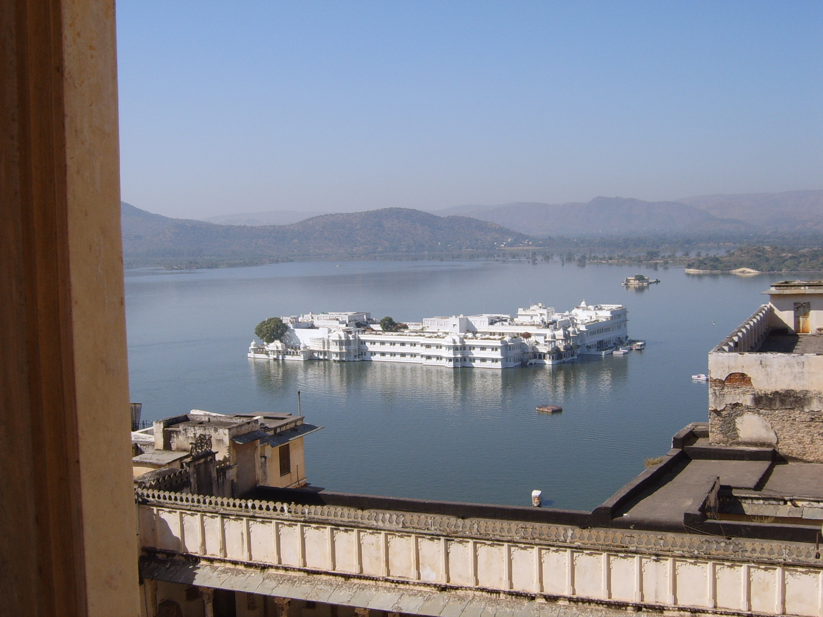 Le Lake Palace à Udaipur, scène du film Octopussy de James Bond, novembre 2005.